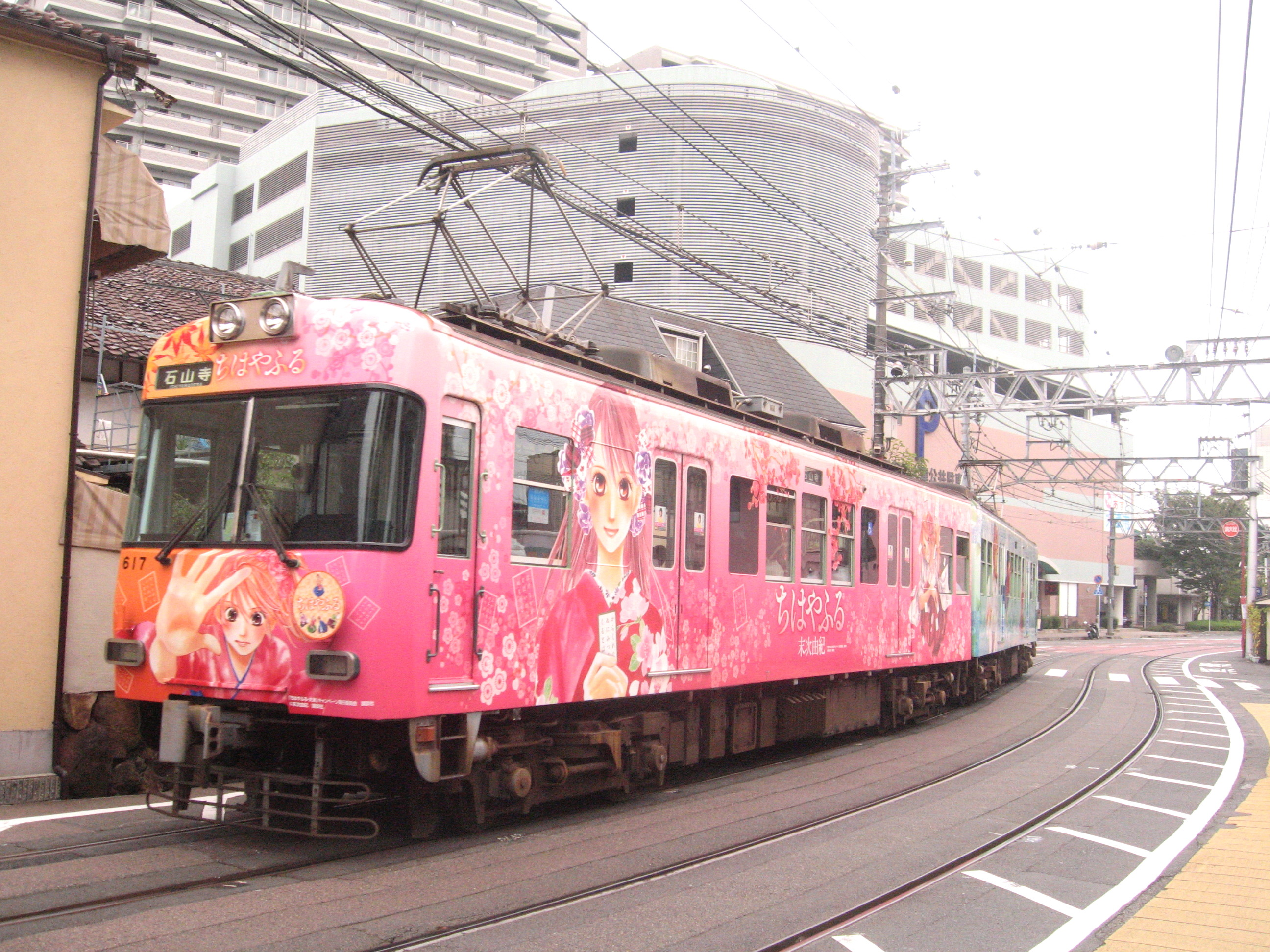 京阪電鉄大津線のラッピング電車